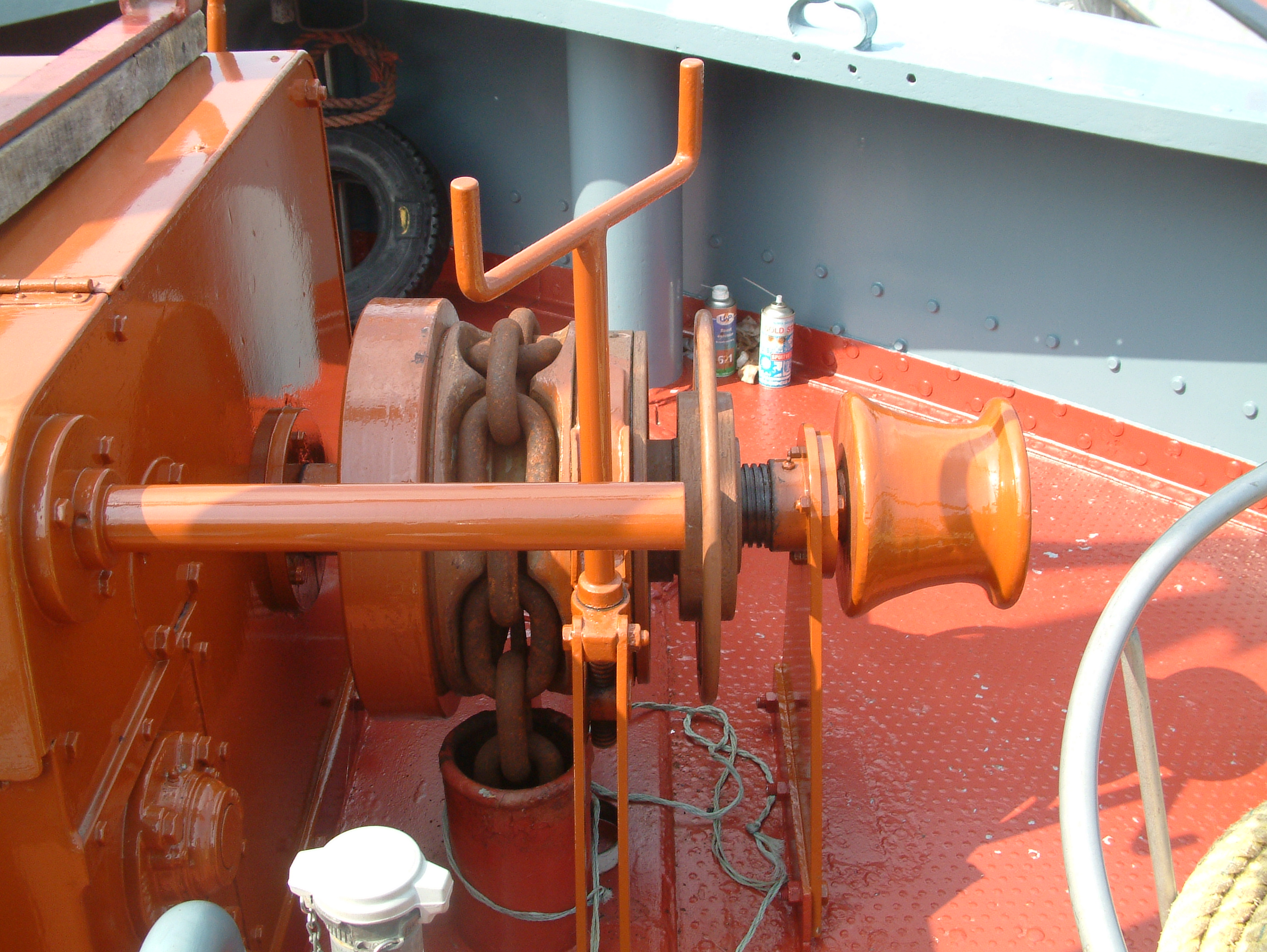 De FEDERATIE op de Industriedag 2008 in de Rijnhaven in Alphen aan den Rijn.